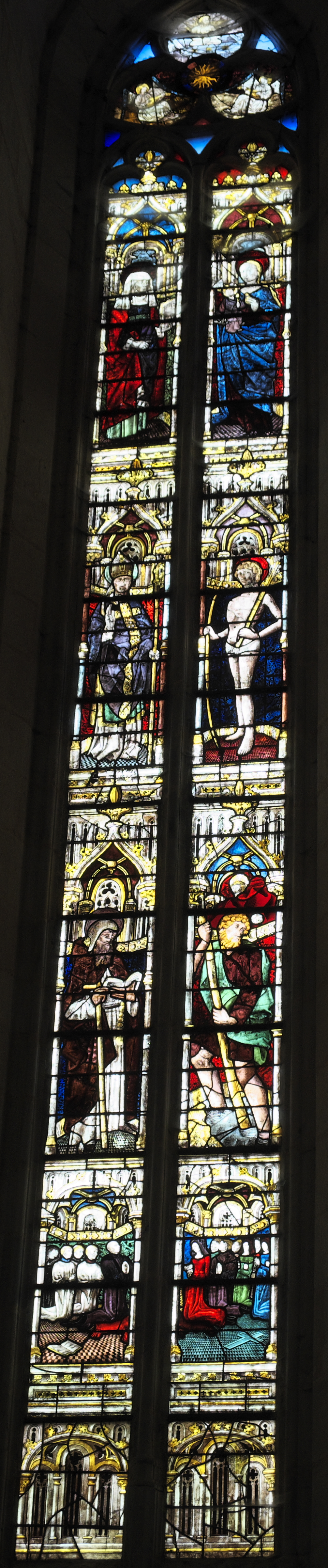 Stiftskirche Saint-Étienne in Eymoutiers im Département Haute-Vienne (Nouvelle-Aquitaine/Frankreich), Bleiglasfenster (Nr. 4) aus dem 15. Jahrhundert, Darstellung: Heiliger Antonius (links), heiliger Christophorus (rechts), darüber Bischof (links) und heiliger Sebastian (rechts), heilige Anna (links), Madonna mit Kind (rechts)